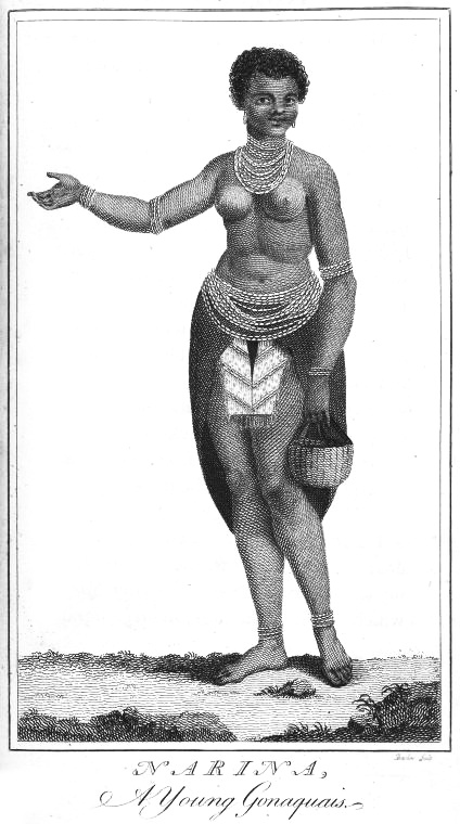 Narina, A Young Gonaquais